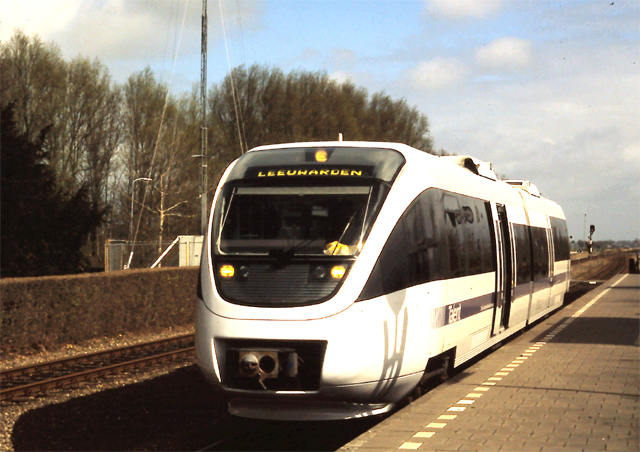 Talent is een prototype treinstel gebouwd door Talbot te Grijpskerk. Dit treinstel werd in 1997 tussen februari en april bij NS getest in de treindienst Leeuwarden - Sneek. Dit treinstel was door een groep gehuurd voor een rit van Groningen naar de STAR te Stadskanaal.